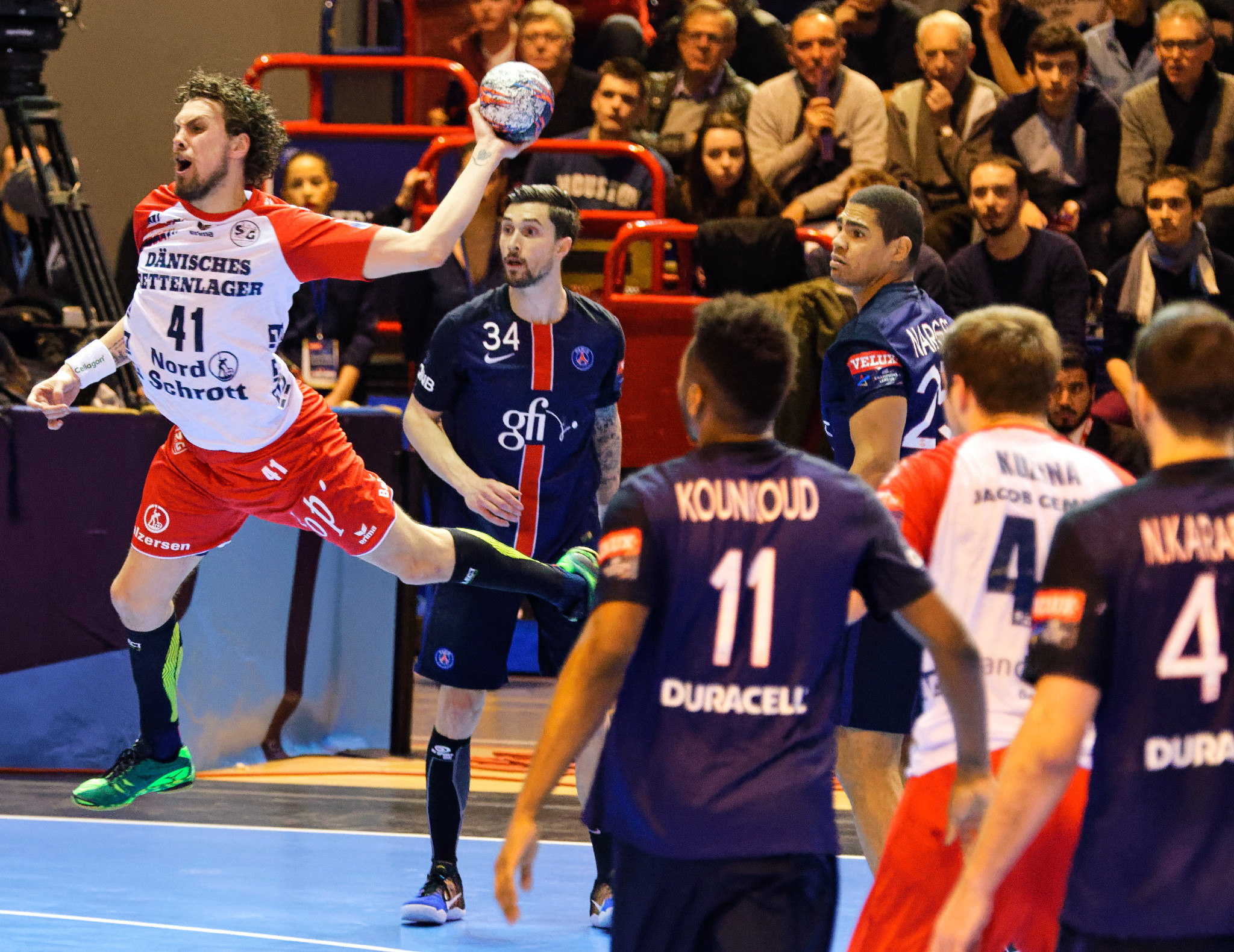 Rencontre de phase de groupe de la Ligue des Champions 2015-16 entre le PSG et SG Flensburg. A la Halle Carpentier (Paris), le 7 mars 2016.